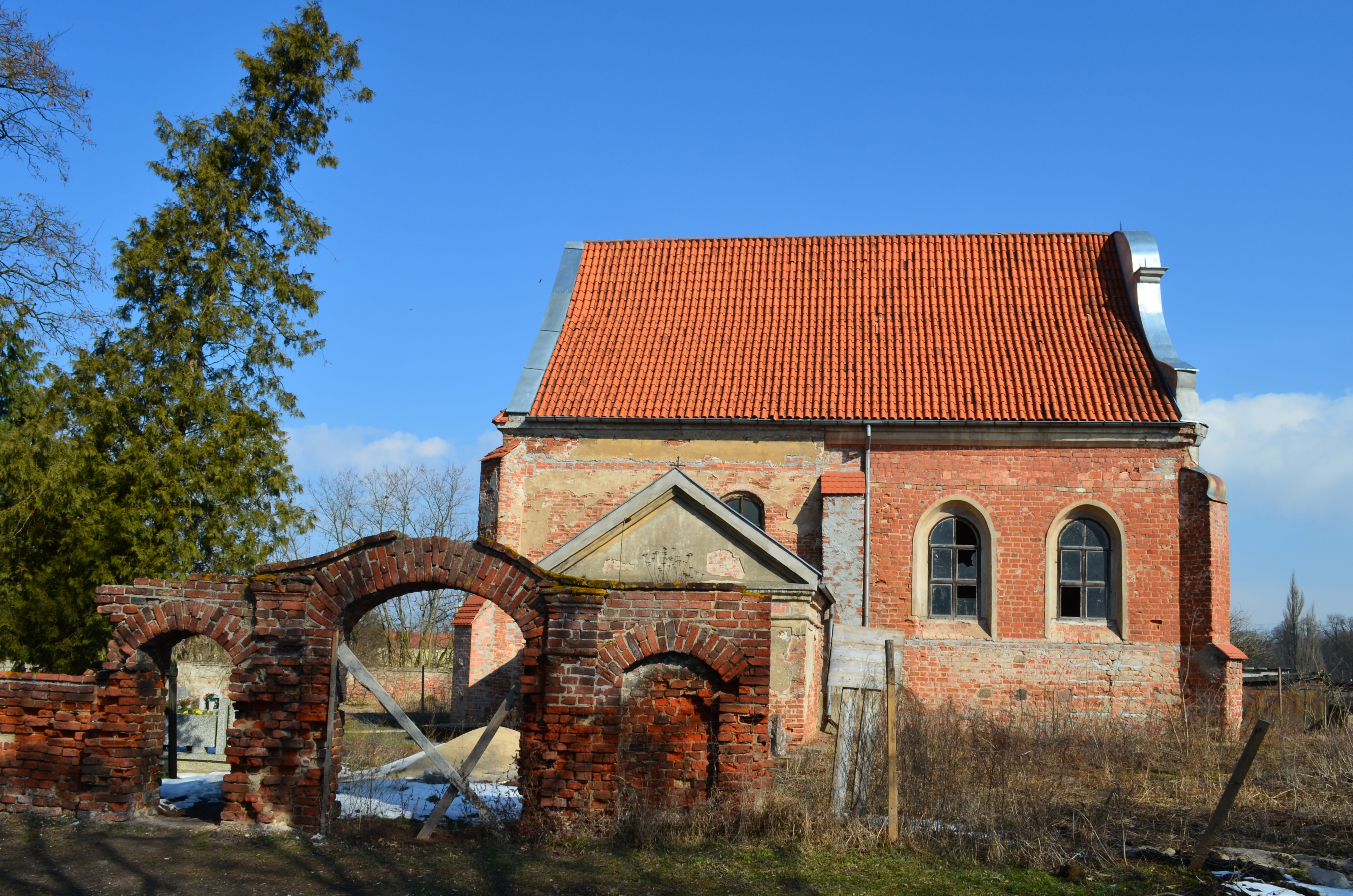 Owińska, kościół par., ob. cmentarny p.w. św. Mikołaja, poł. XVI